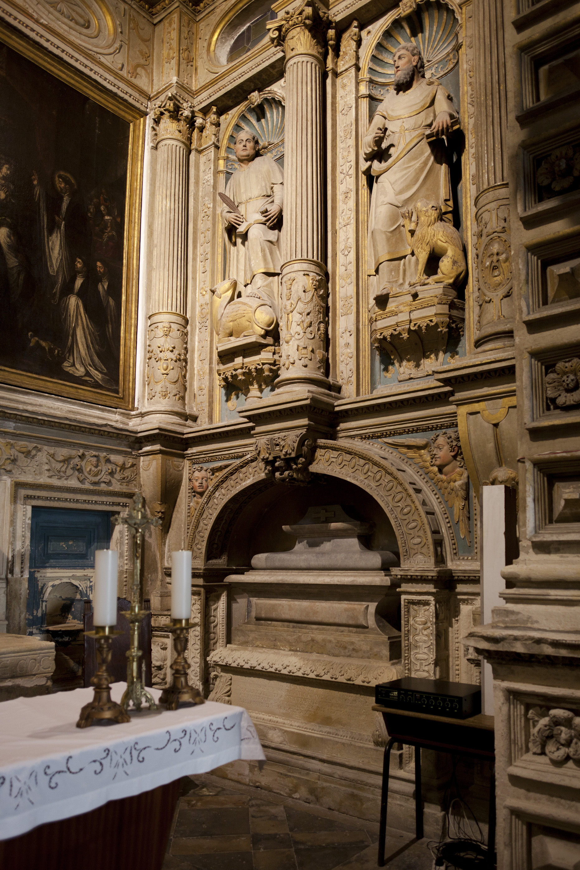 Tomé Velho, Capela de S. Teotónio, Mosteiro de Santa Cruz, Coimbra